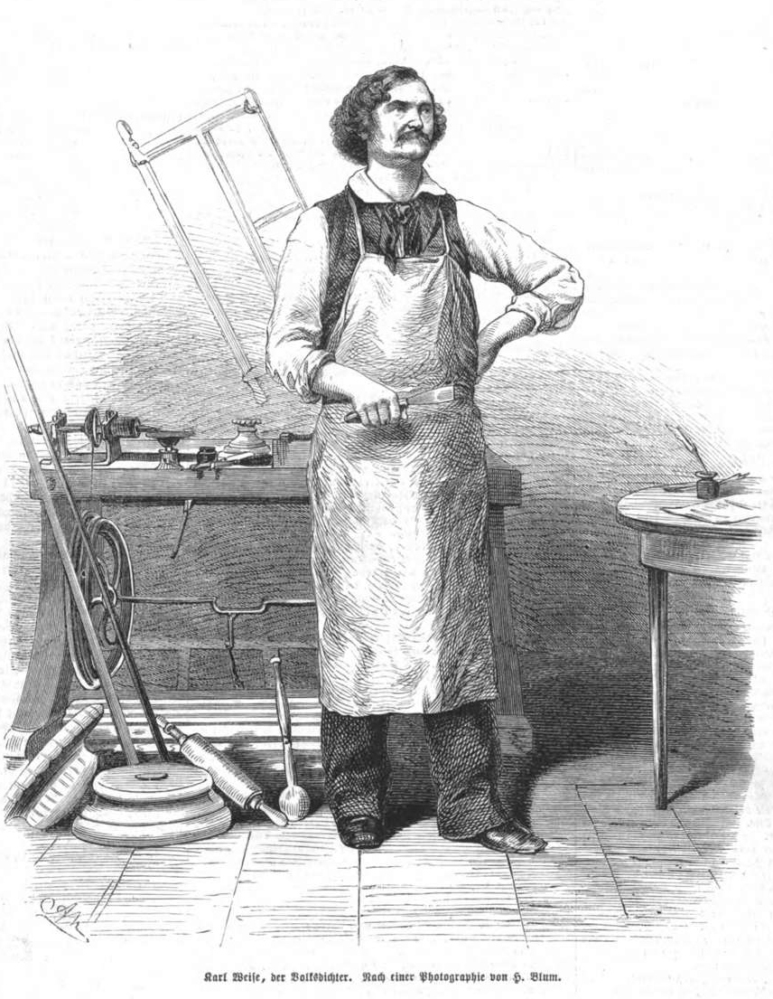 Karl Weise, Drechsler und deutscher Volksdichter, 1864.